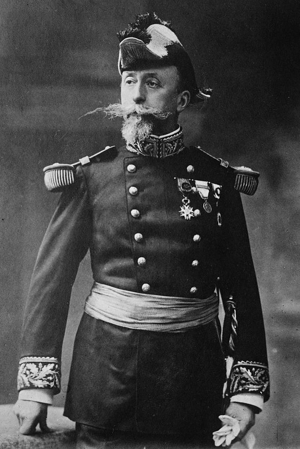 French general Étienne de Villaret (1854-1931)